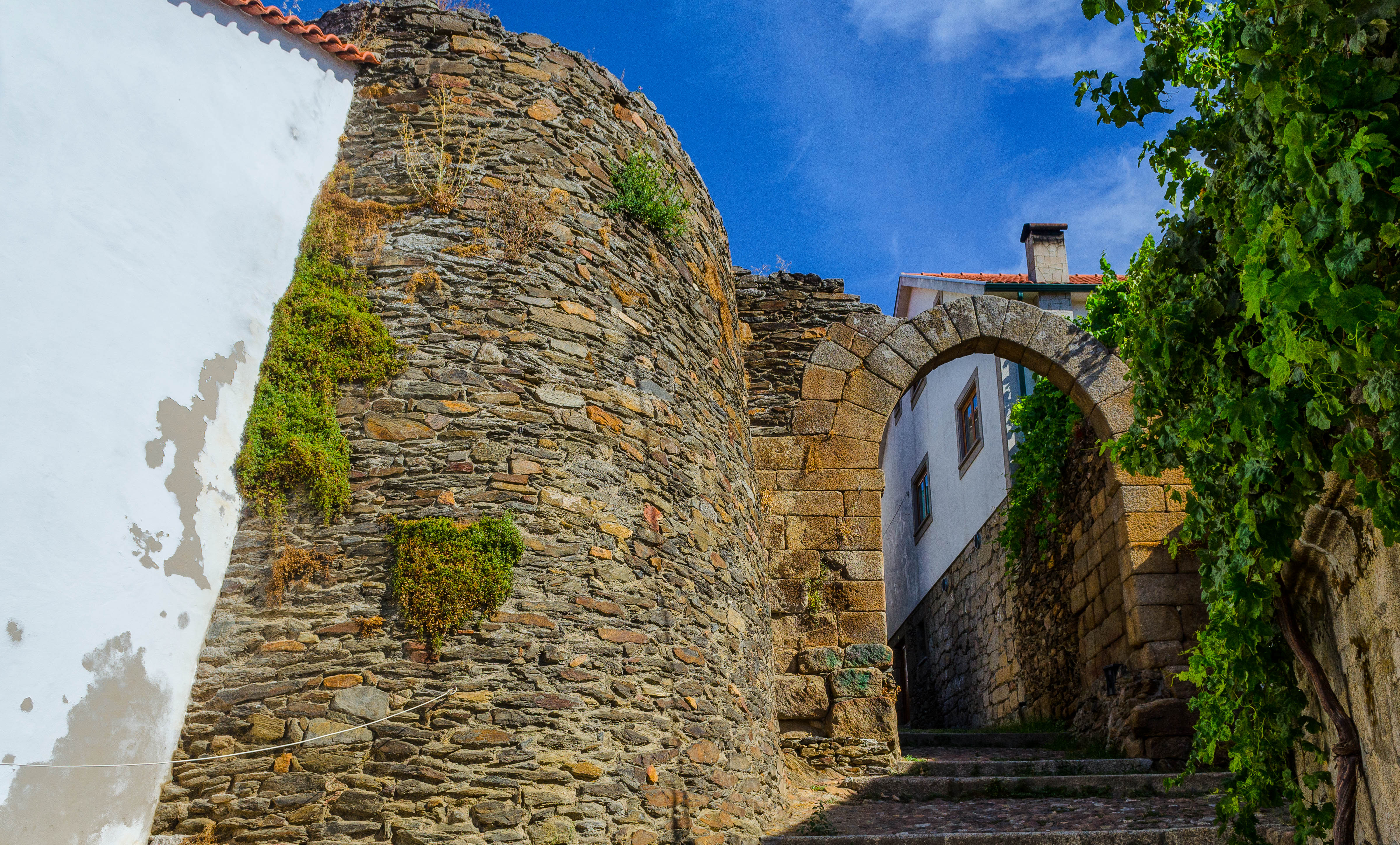 Vila_Flor_Arco_de_Dom_Dinis